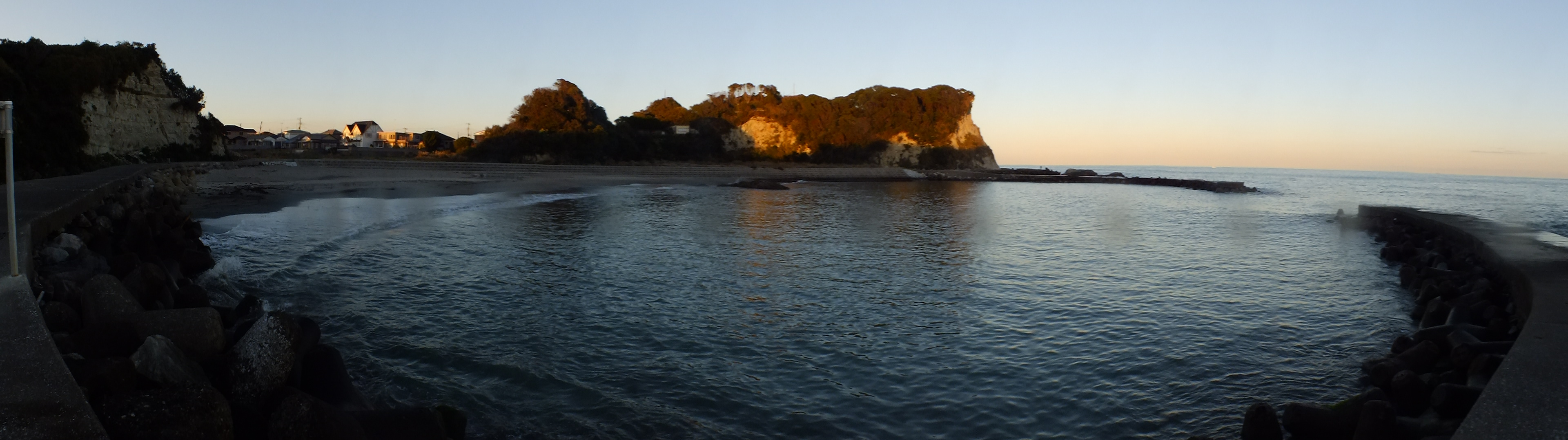 2013-11-30 Hachiman-Misaki Ohhara Isumi いすみ市大原八幡岬